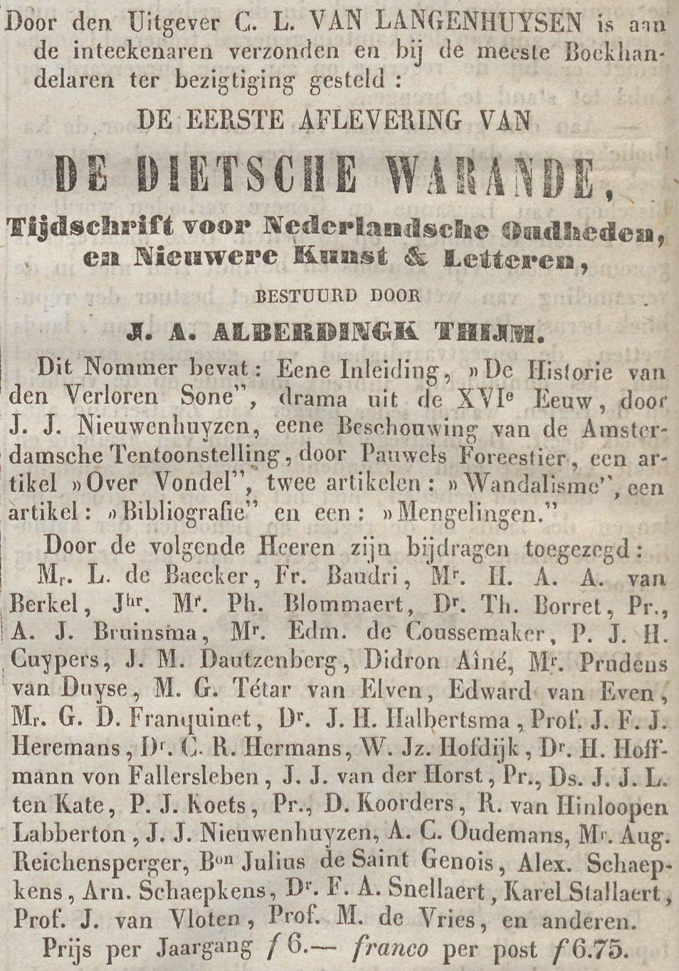 Advertentie De Dietsche Warande. Afkomstig uit De Tijd, maandag 15 januari 1855, [p. 4].